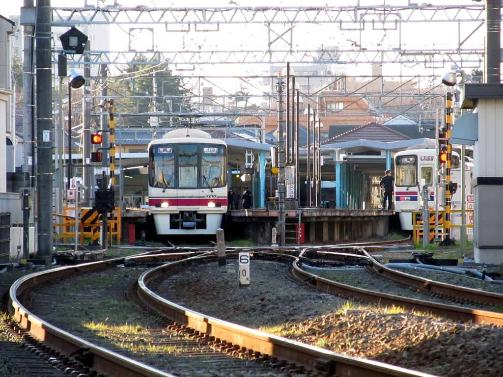 府中競馬場正門前駅 京王競馬場線。東京都府中市